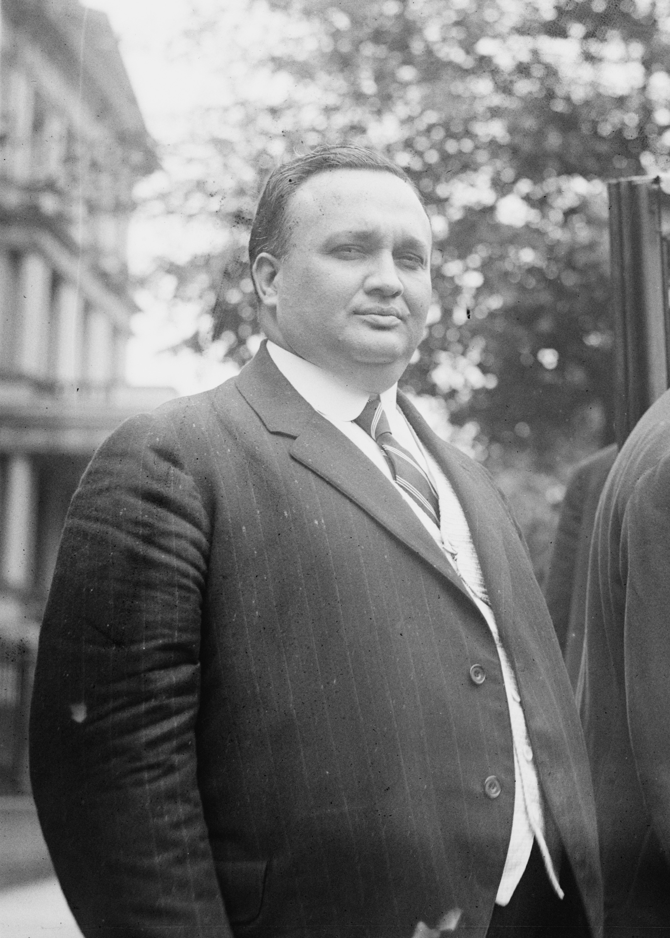 Depicted person: Álvaro Torre Díaz